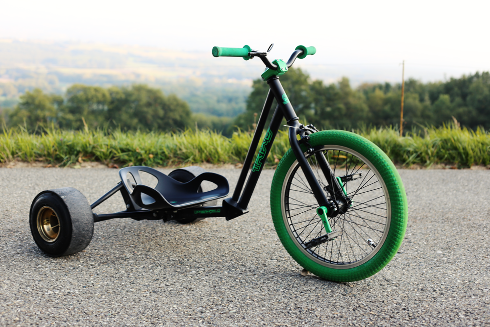 Drift trike de la marque Triad Performance, équipé de roue arrières de karting en magnésium, recouvertes d'une bande de tube PE.